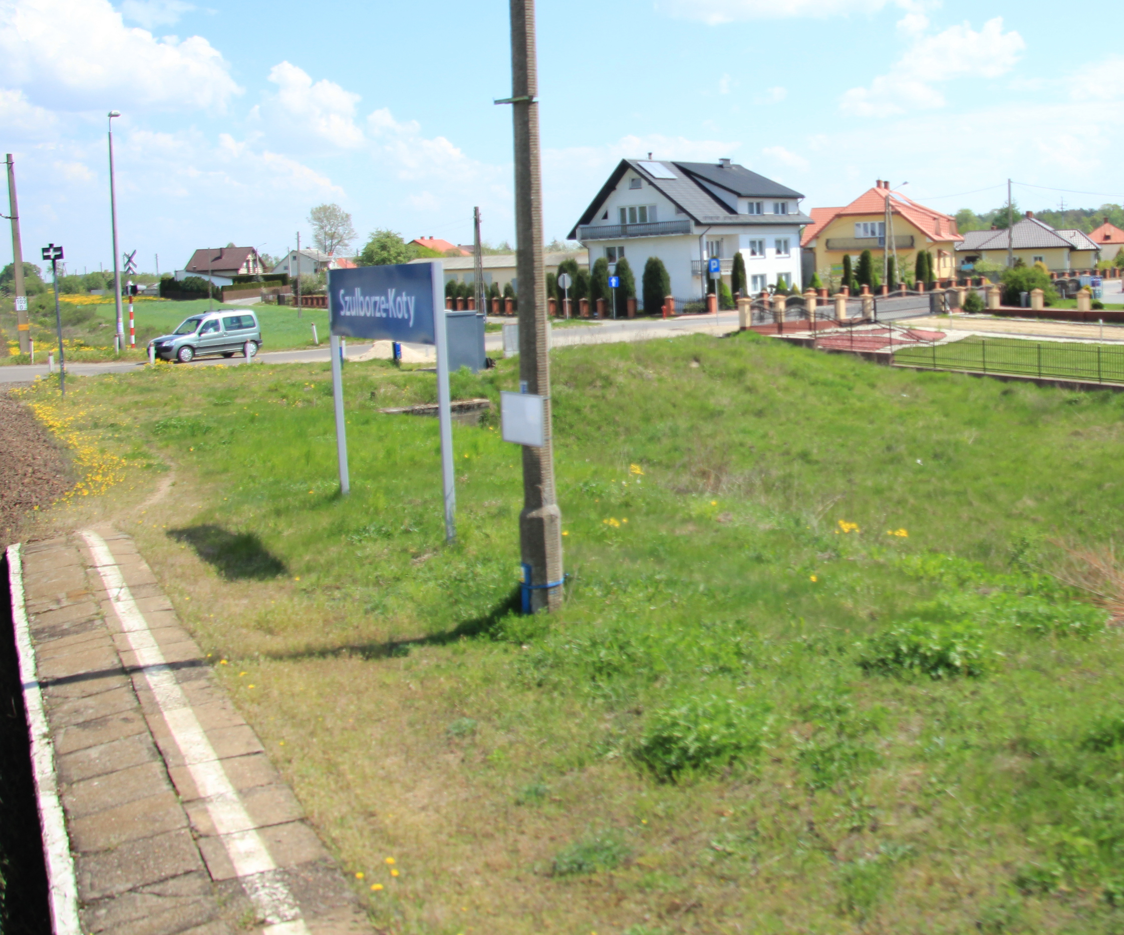 Szulborze-Koty przystanek kolejowy w Szulborzu Wielkim - woj. mazowieckie. Aktualna nazwa przystanku to Szulbierze Wielkie